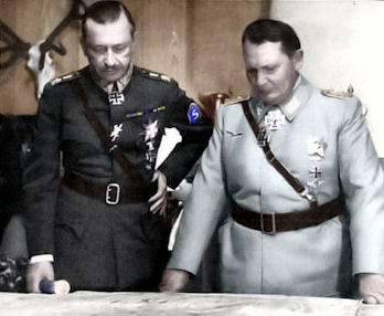 Marsalkka Mannerheim ja Saksan valtakunnanmarsalkka Göring. Kuvaa on jälkikäsitelty.